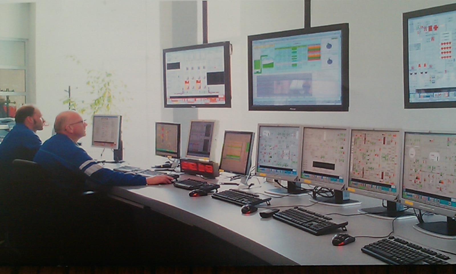 Salle de contrôle de la centrale électrique de Ruien